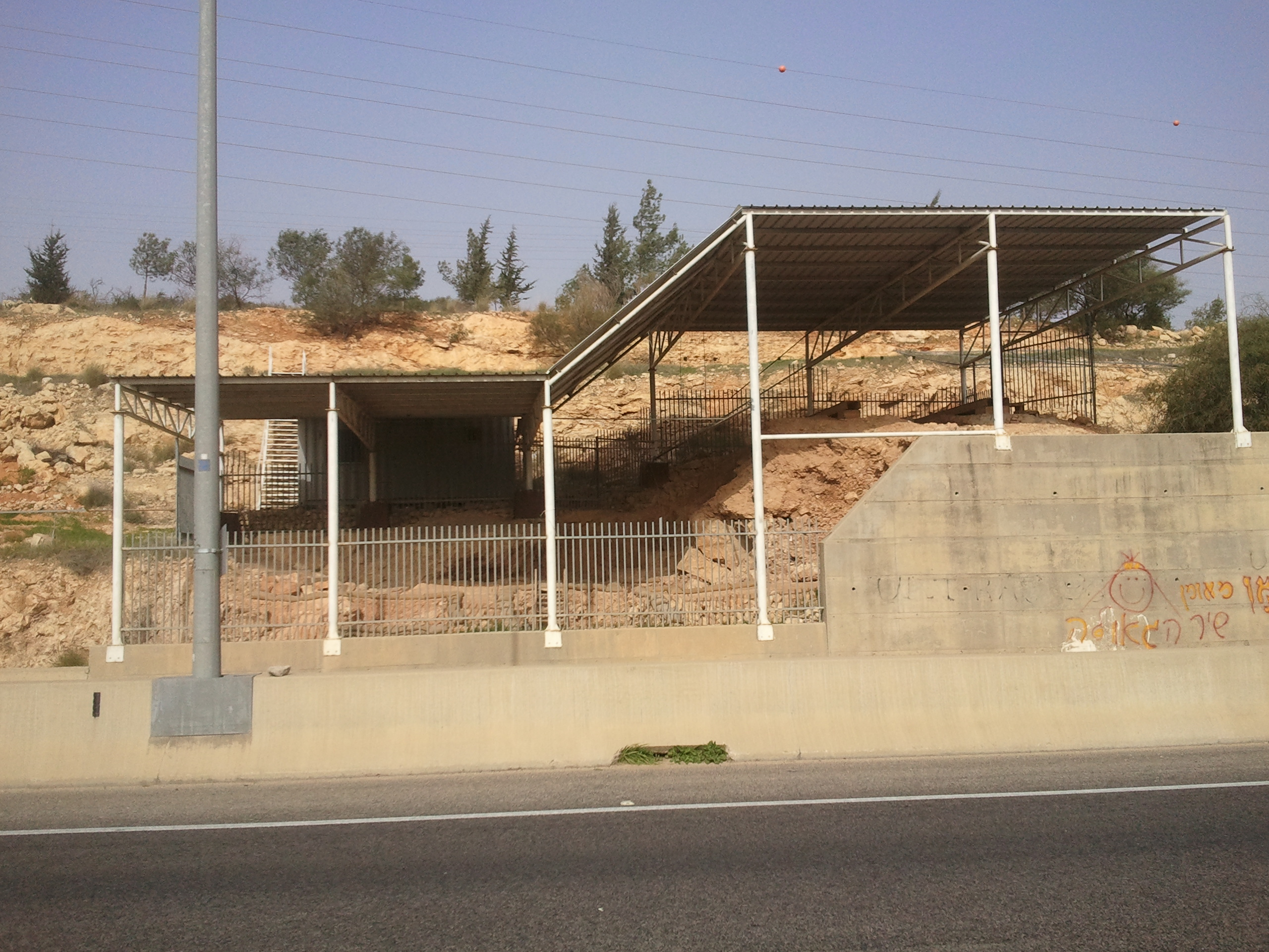 מערת קסם מראה מבכיש 5